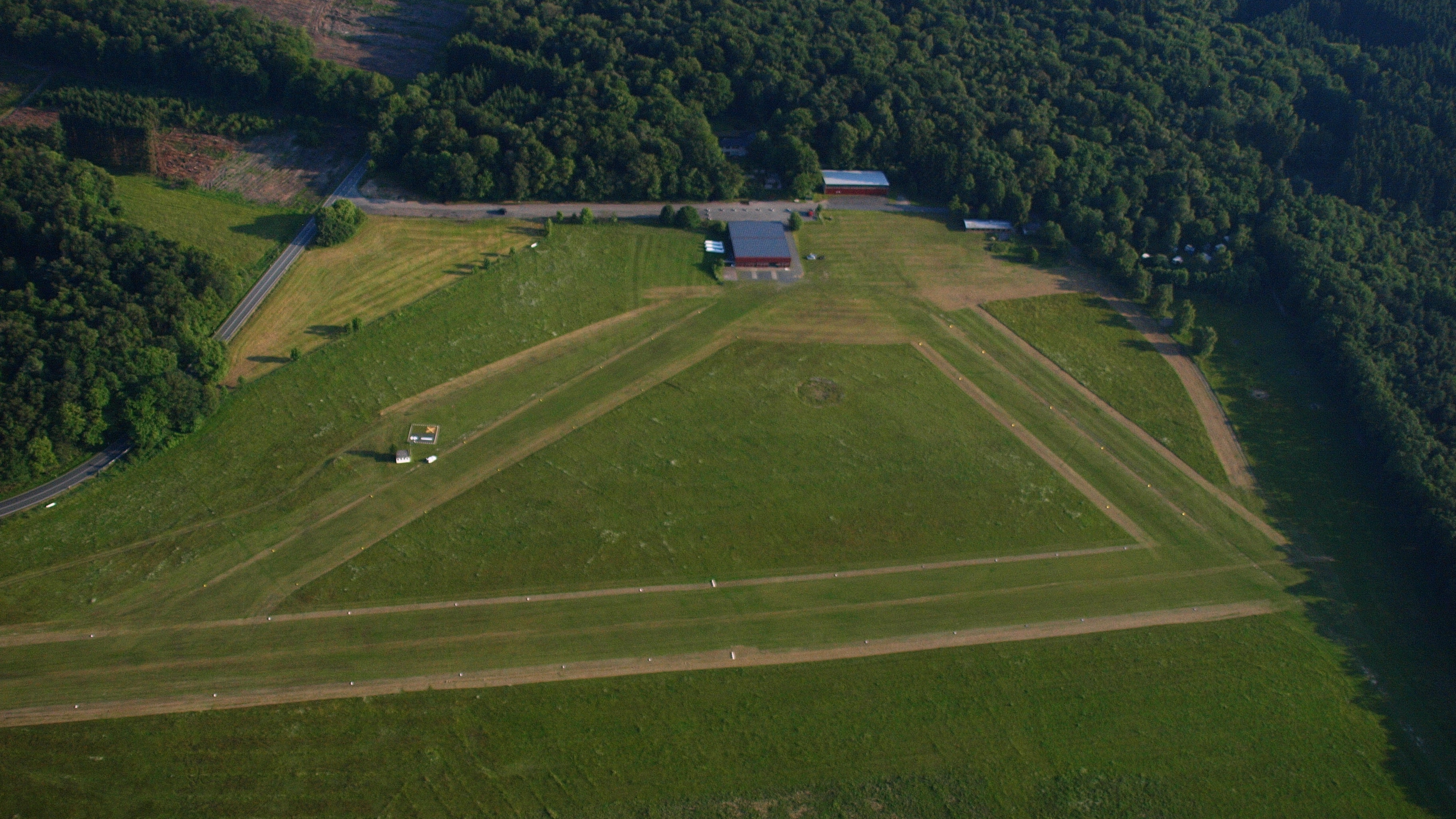 Segelflugplatz Eudenbach, Königswinter/Bad Honnef: Luftaufnahme; links die Landesstraße 272 (Grenze zwischen Nordrhein-Westfalen und Rheinland-Pfalz)